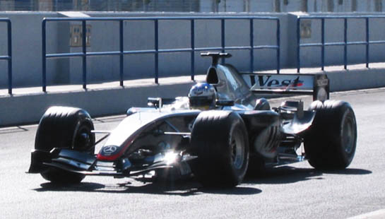 Circuito de Jerez; Jerez Circuit